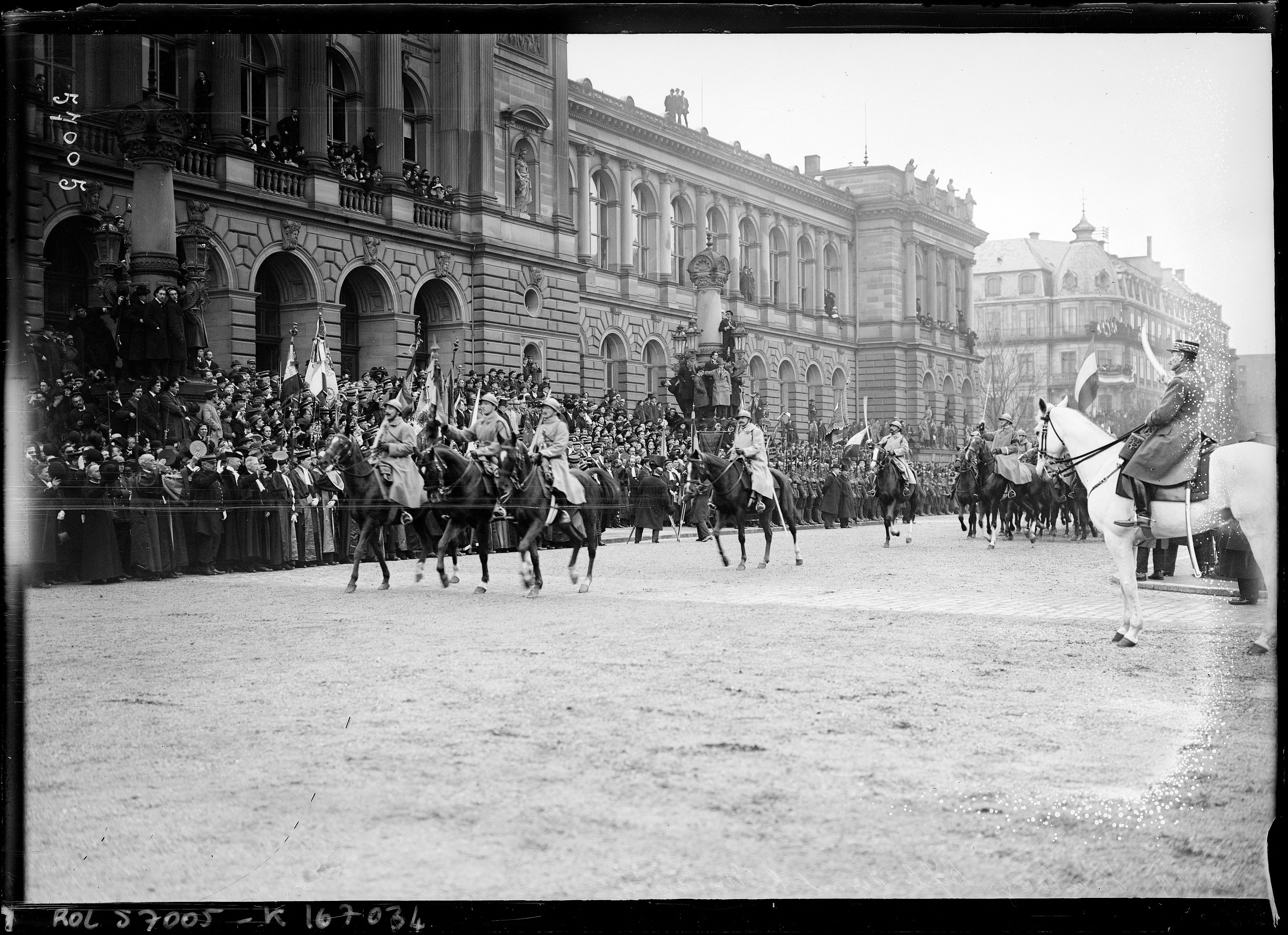 Titre : 22-11-19, Strasbourg, défilé devant l'université [inauguration de l'université] : [photographie de presse] / [Agence Rol] Auteur : Agence Rol. Agence photographique Date d'édition : 1919 Sujet : Inaugurations -- France -- Strasbourg (Bas-Rhin) Sujet : Strasbourg (Bas-Rhin) Sujet : Université de Strasbourg (1538-1970) Type : image fixe,photographie Langue : Français Format : 1 photogr. nég. sur verre ; 13 x 18 cm (sup.) Format : image/jpeg Droits : domaine public Identifiant : ark:/12148/btv1b53030878n Source : Bibliothèque nationale de France, département Estampes et photographie, EI-13 (682) Relation : Description : Référence bibliographique : Rol, 57005 Provenance : bnf.fr Date de mise en ligne : 24/12/2012